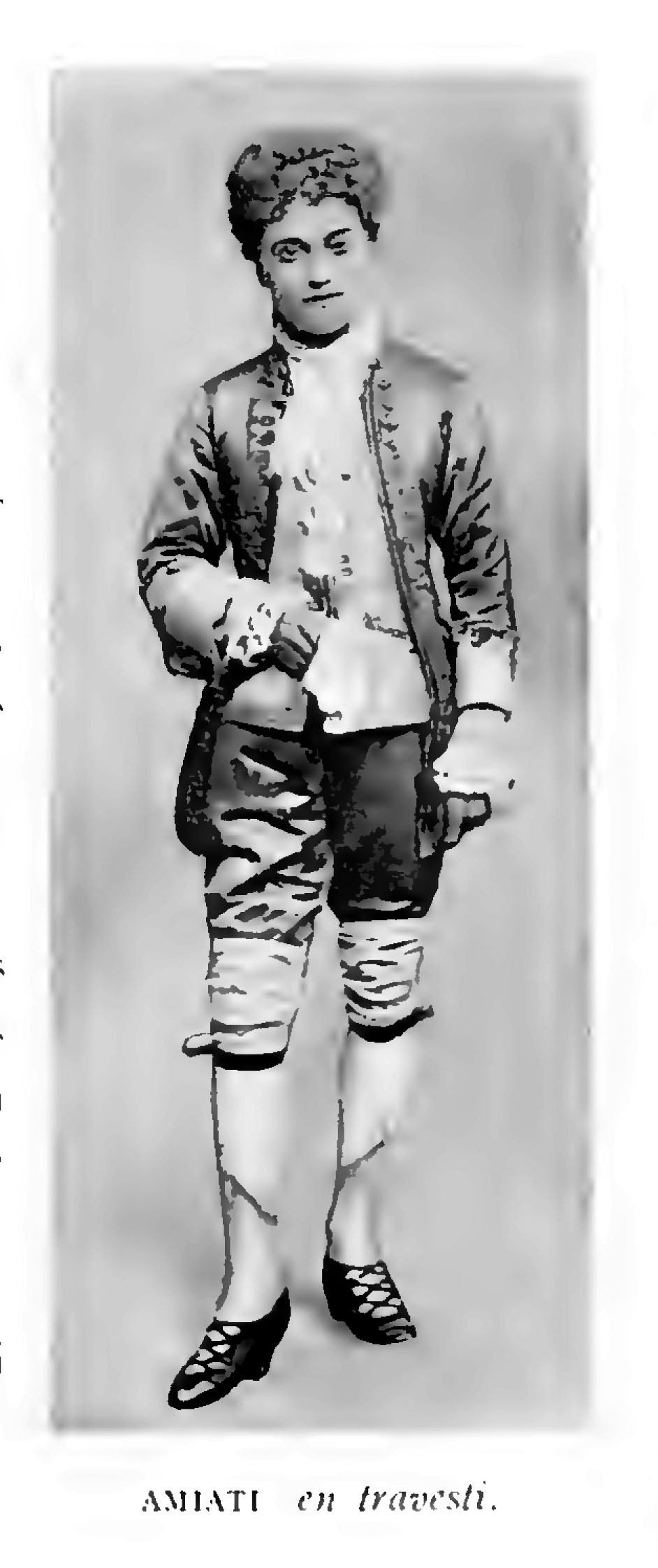 Photogravure d'Amiati dans Trente ans de café-concert, les mémoires de Paulus, p. 181.